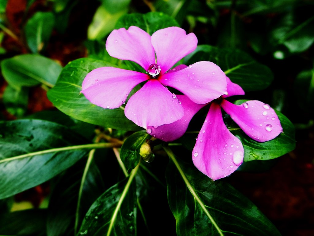 നിത്യകല്യാണി